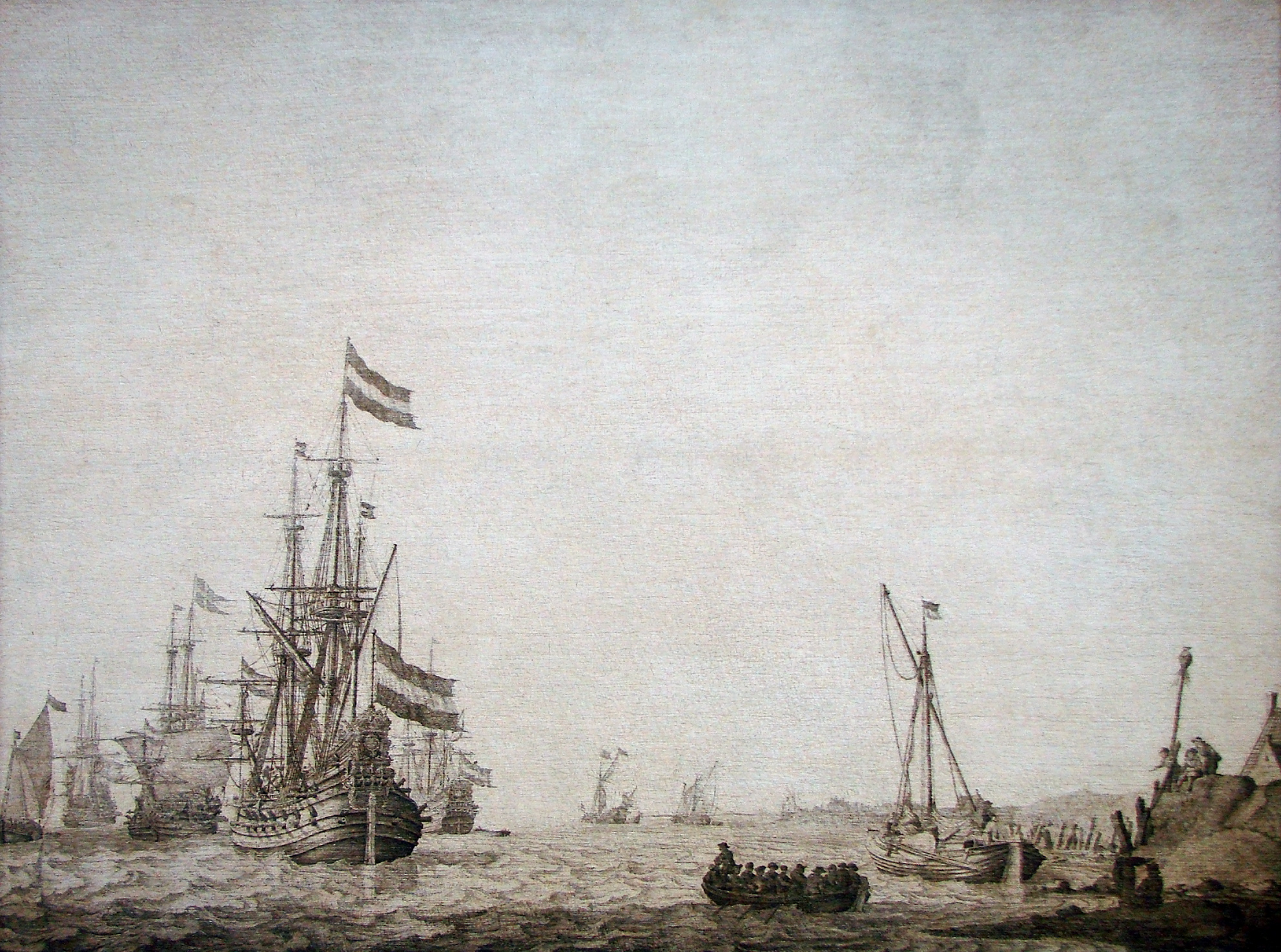 Marine; un bateau hollandais à l'ancre près du rivage, par Willem van de Velde l'Ancien, dit "le peintre à la plume" (vers 1641-1693). de Lille.